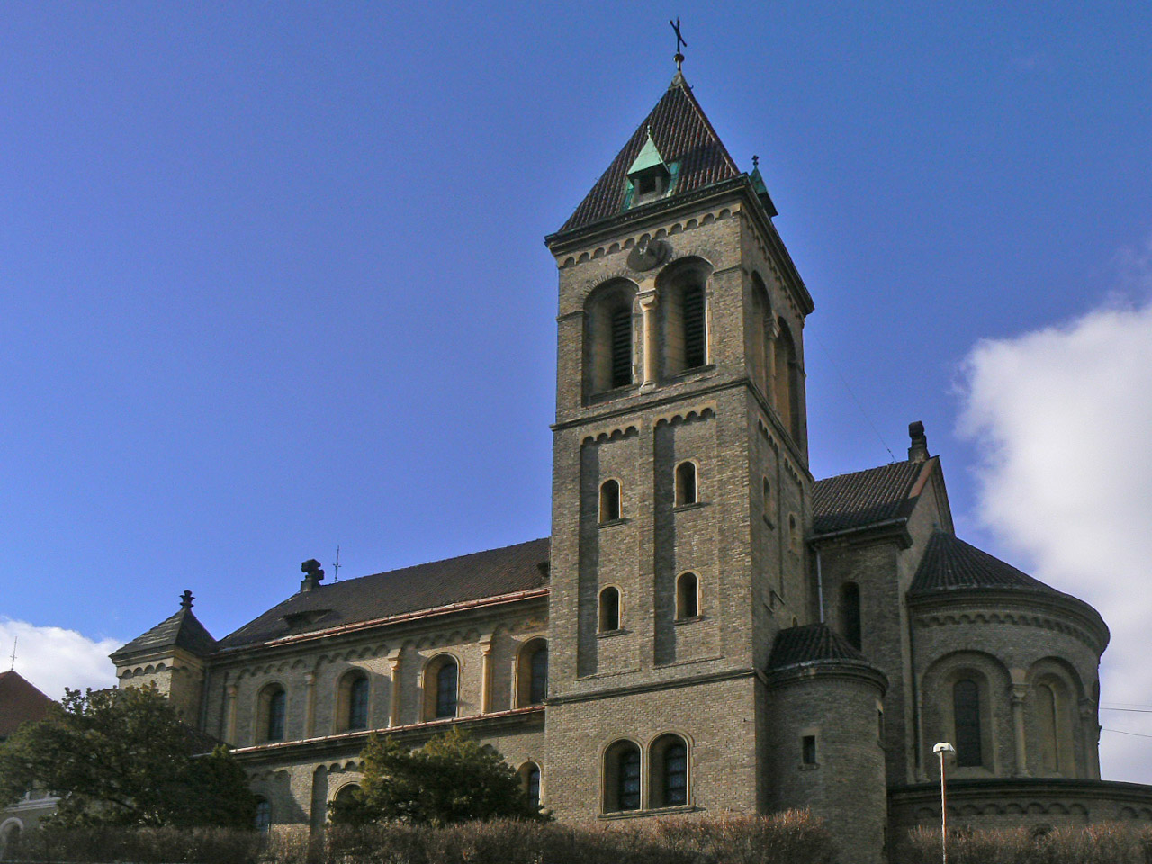 Kostel Zvěstování Panně Marii, zvaný též "kostel sv. Gabriela", v Holečkově ulici v Praze 5 na Smíchově (Church of the Annunciation, called also "St. Gabriel Church", in Holečkova Street in Prague-Smíchov, Czechia)